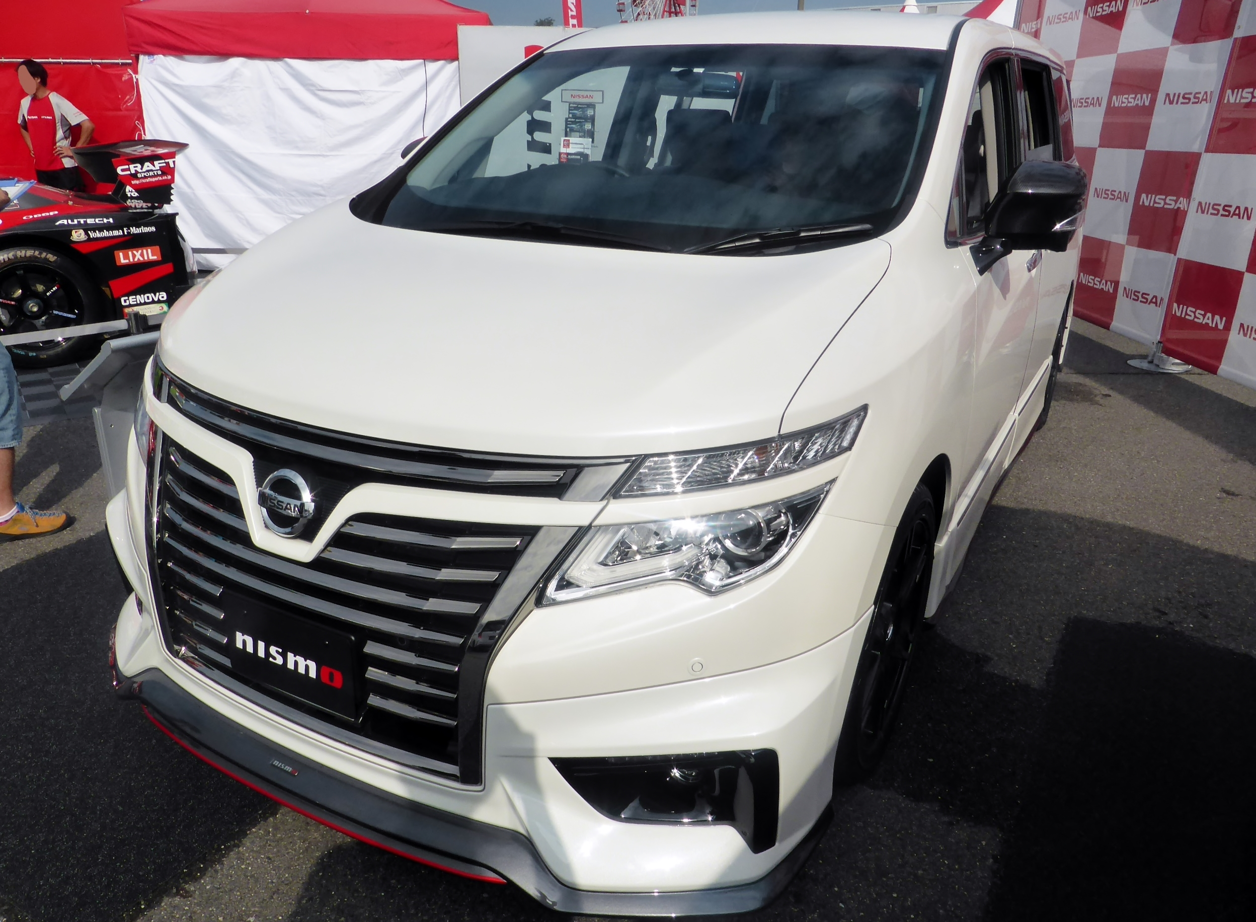 E52型日産・エルグランドニスモパフォーマンスパッケージAキットをフロントから撮影。